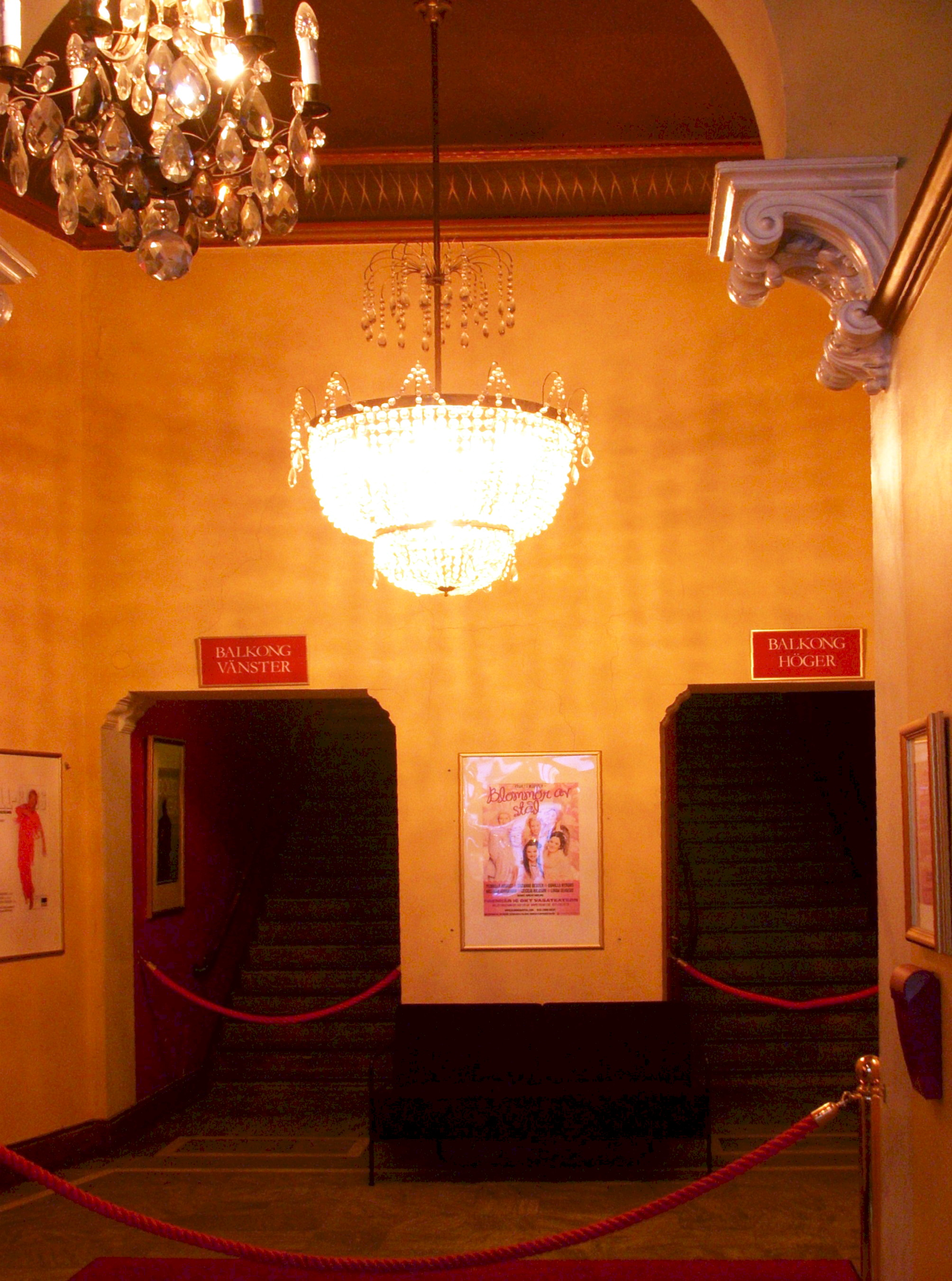 Vasateatern i Stockholm, entré